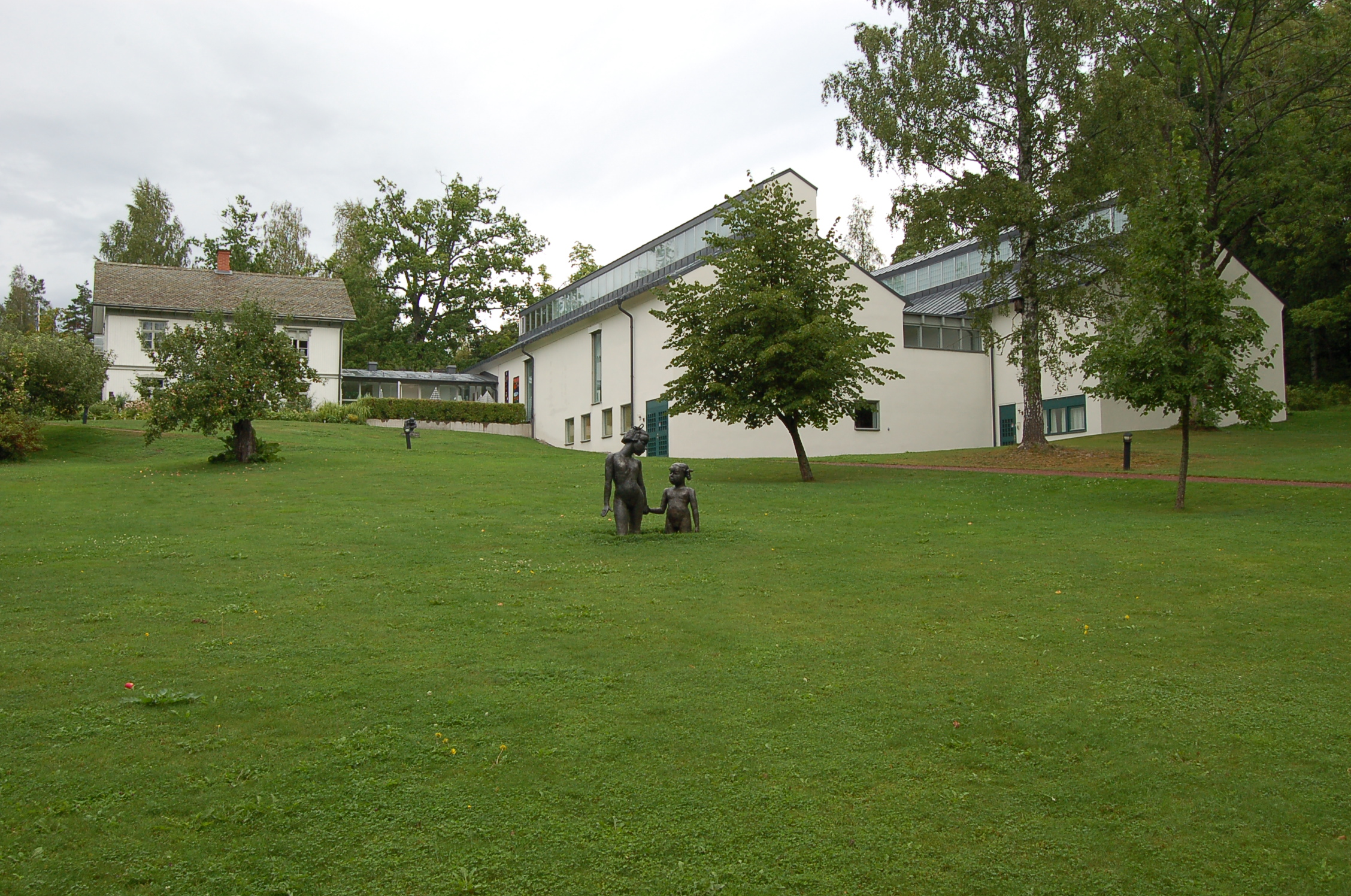 Vy över Rackstadsmuseet i Arvika